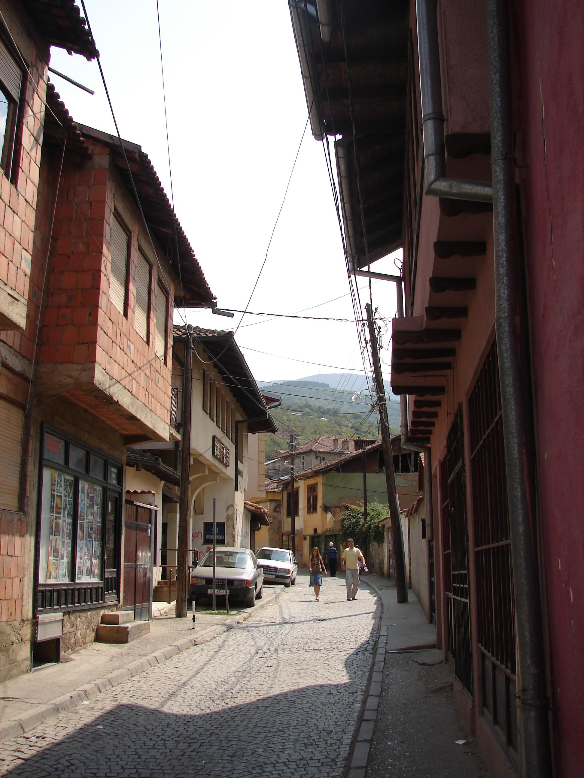 A street in Prizren, Kosovo